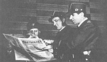 Старшина Карпатської Січі. З ліва до права: Іван Рогач, Іван Роман і Федір Тацинець.